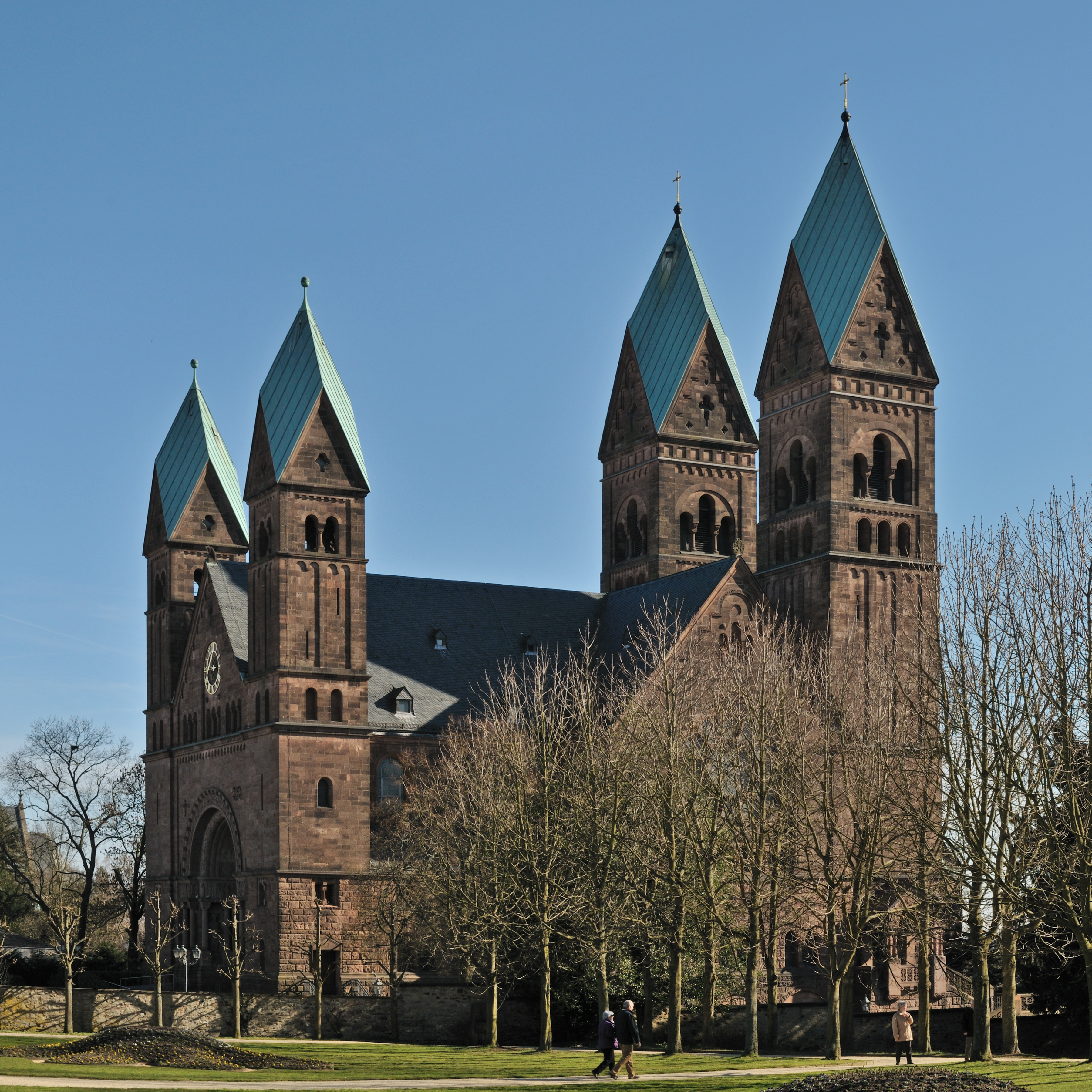 Erlöserkirche Bad Homburg: Blick vom Bad Homburger Schloß